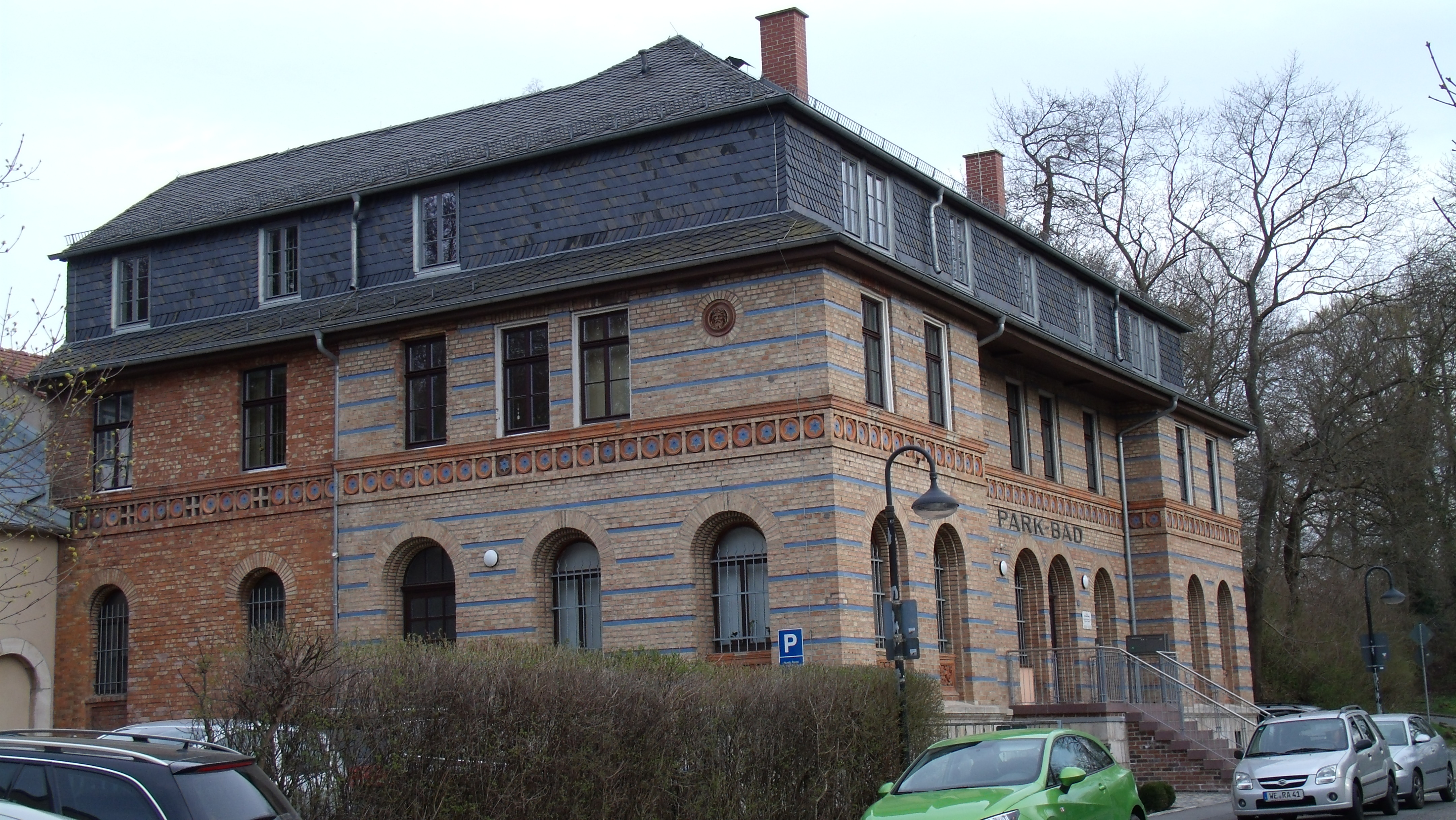 Das Ilm-Athener Parkbad.